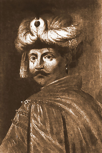 Tymofiy Khmelnytsky